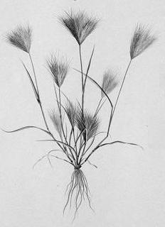 Illustrations de Description de l'Egypte Bromus rubens